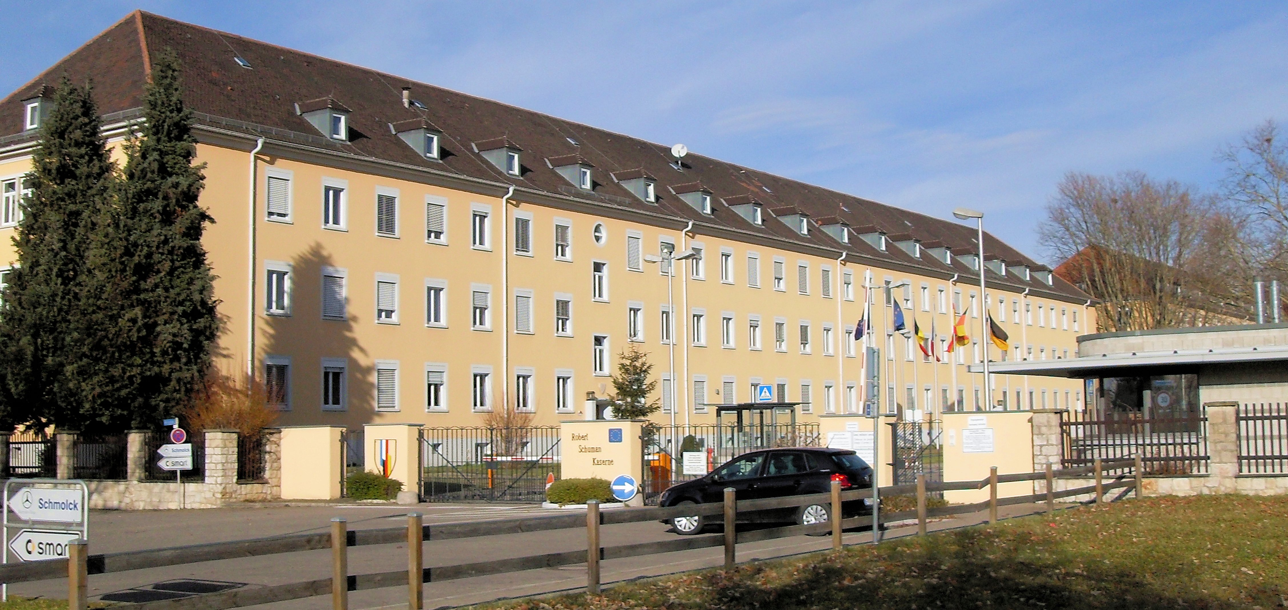 Robert-SWchuman-Kaserne, Stab der Deutsch-Französischen Brigade in Müllheim, Baden